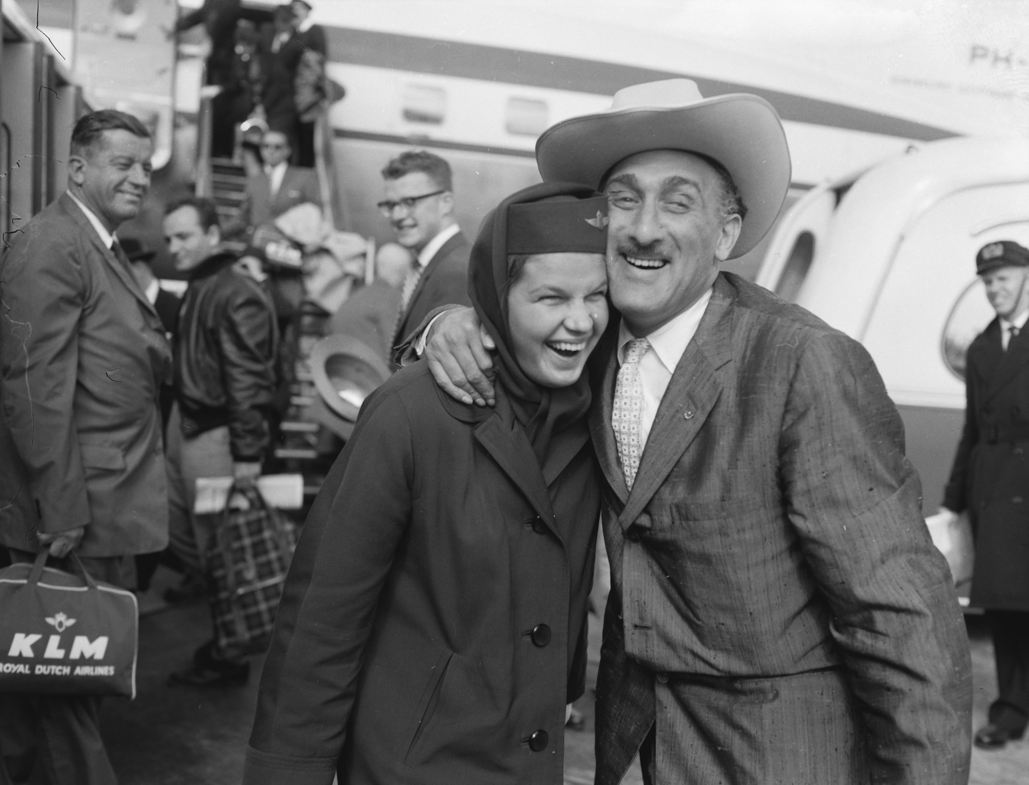 Collectie / Archief : Fotocollectie Anefo Reportage / Serie : [ onbekend ] Beschrijving : Aankomst van Max Tailleur op Schiphol uit Amerika Datum : 25 september 1958 Locatie : Noord-Holland, Schiphol Trefwoorden : AANKOMST Persoonsnaam : Tailleur, Max Fotograaf : Rossem, Wim van / Anefo Auteursrechthebbende : Nationaal Archief Materiaalsoort : Negatief (zwart/wit) Nummer archiefinventaris : bekijk toegang 2.24.01.04 Bestanddeelnummer : 909-8741